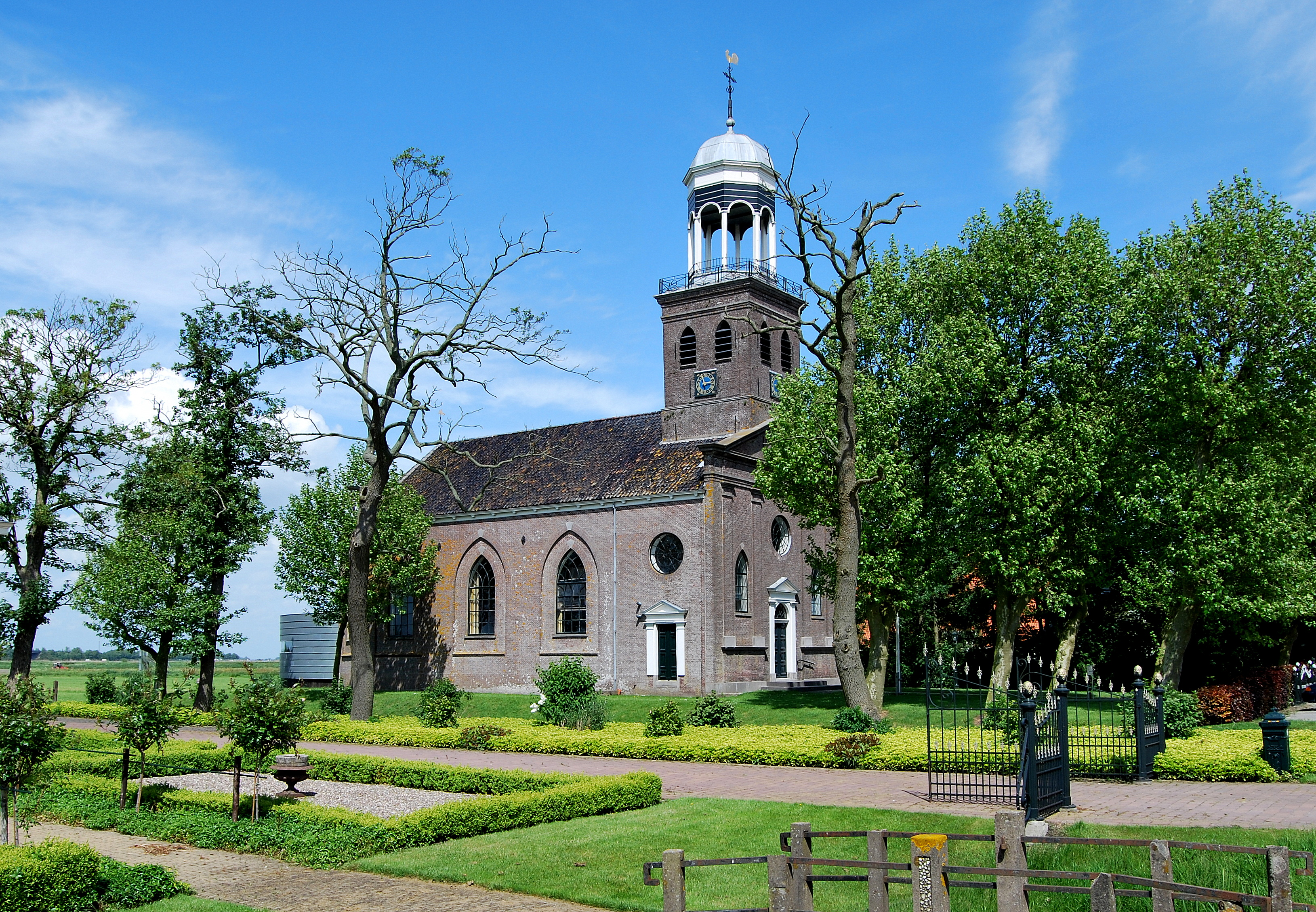 Eastersee, Martinustsjerke